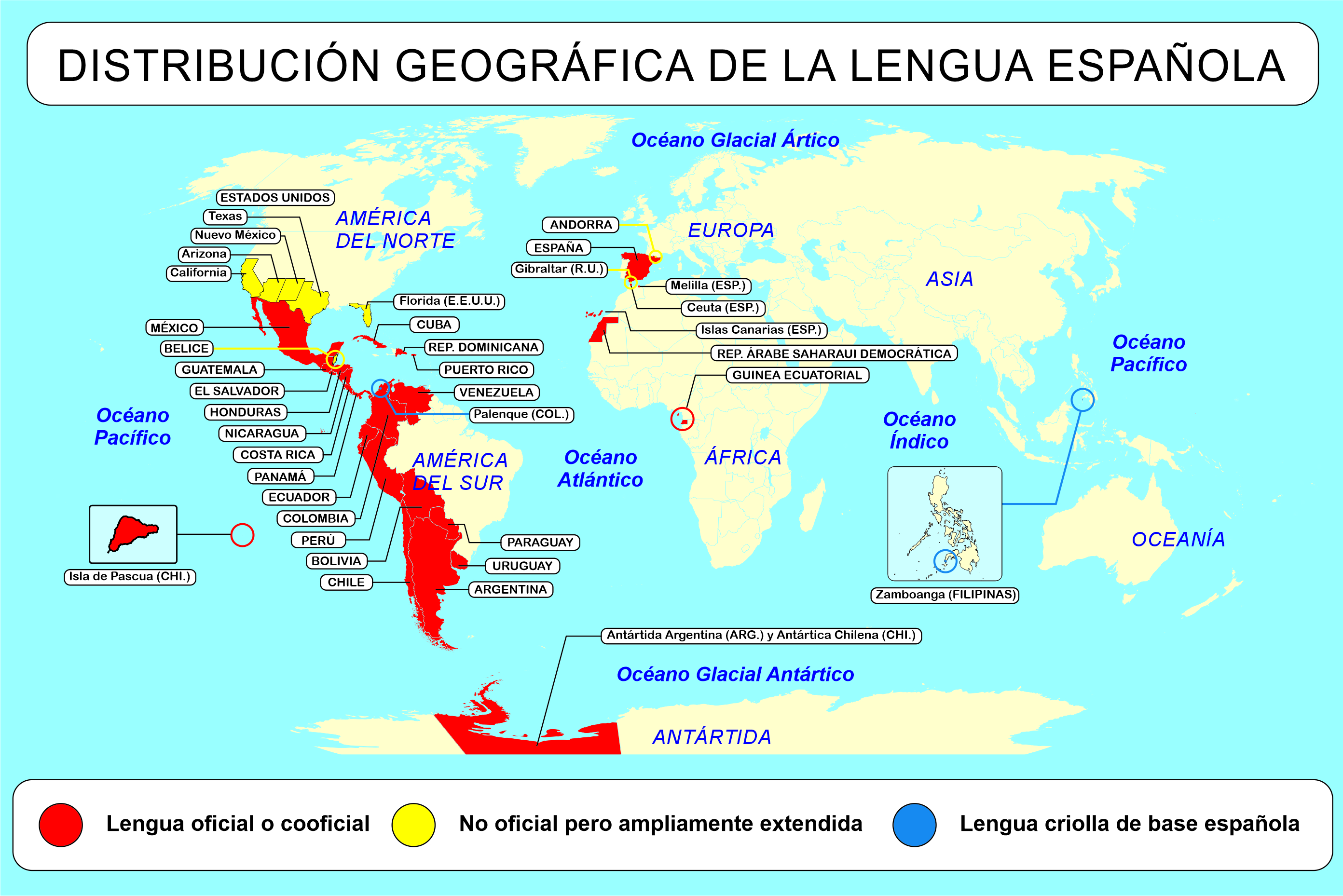 Distribución geográfica de la lengua española en cada continente.